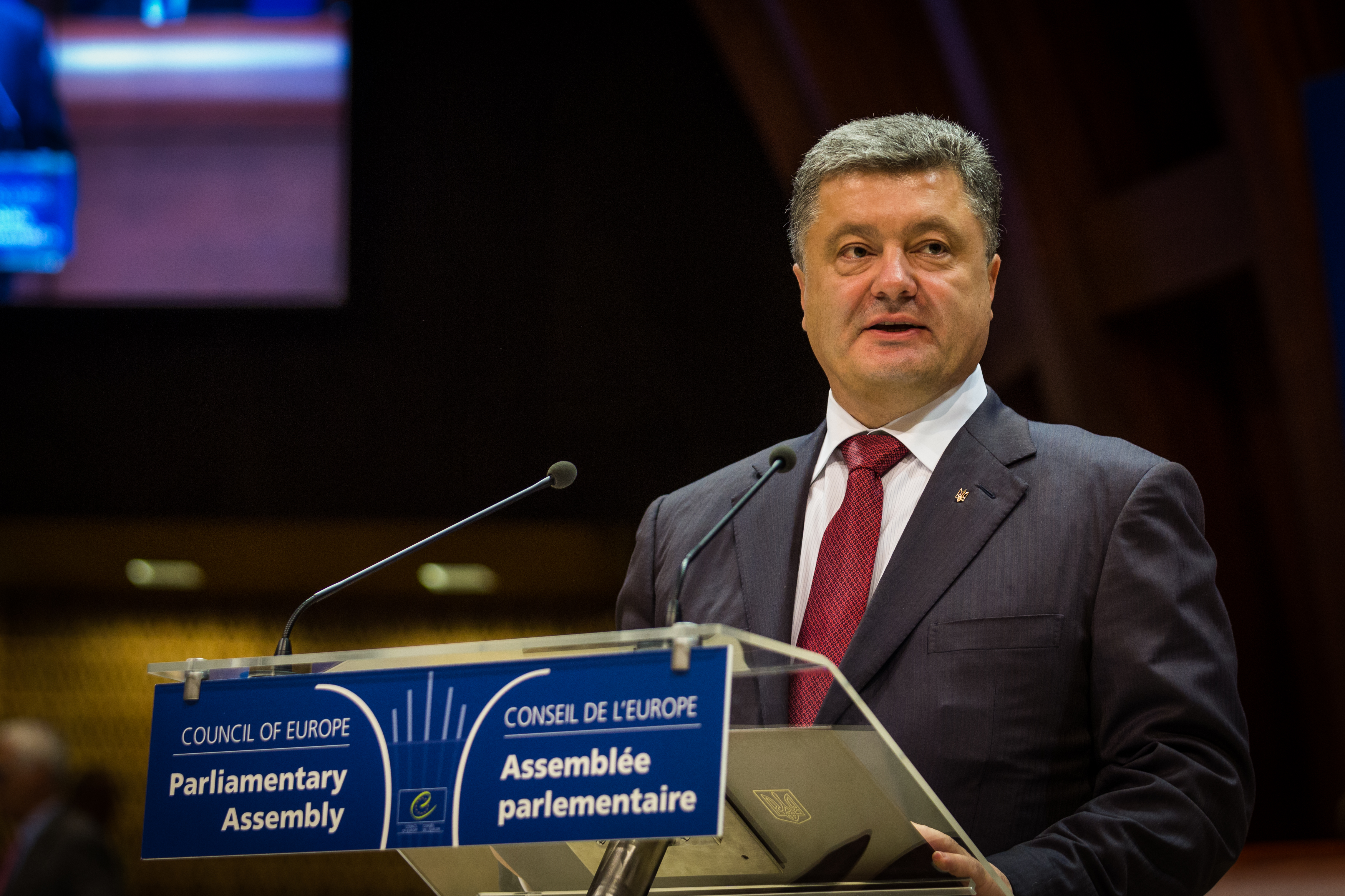 Visite officielle du Président de la République d’Ukraine Petro Porochenko au Conseil de l’Europe, Strasbourg 26 juin 2014.